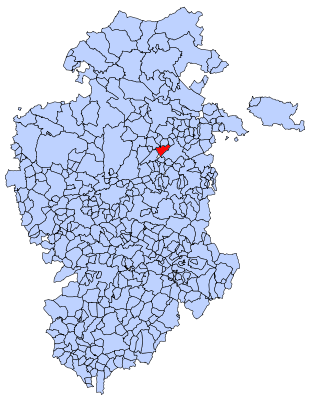 Salinillas de Bureba en Burgos